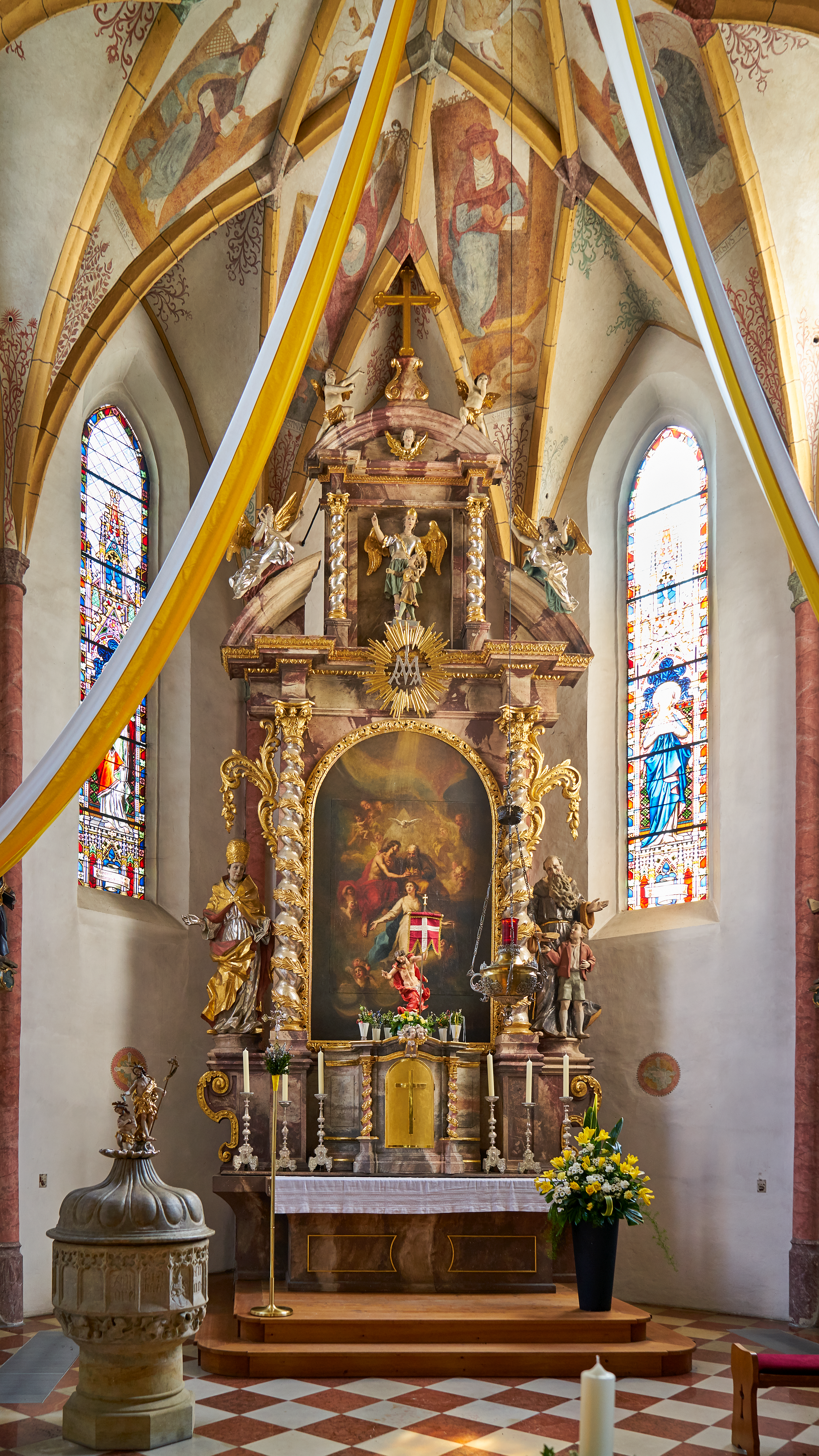 Katholische Pfarrkirche Mariä Himmelfahrt Ering. Der im Kern spätbarocke Hochaltar; Gemälde mit einer Darstellung der Marienkrönung aus der Mitte des 18. Jahrhunderts.